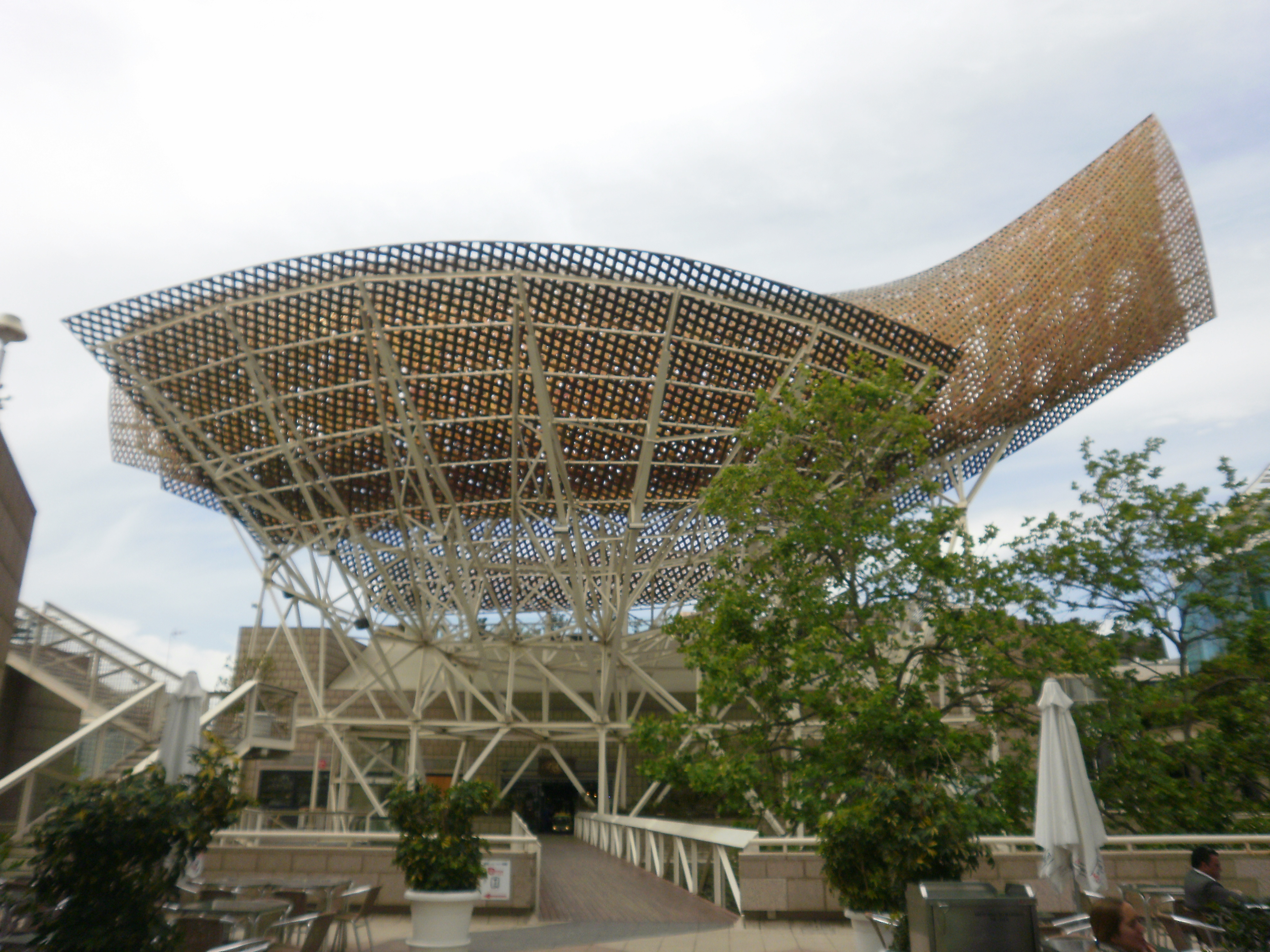 Peix de la Barceloneta